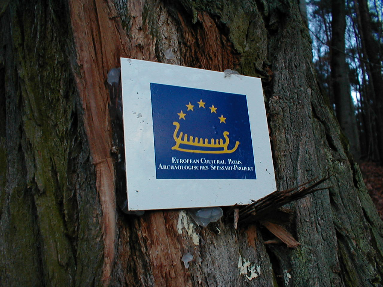 Hinweisschild des Archäologischen Spessart-Projekts an einem Baum, Foto selbst aufgenommen am 1. Januar 2006, GNU-FDL